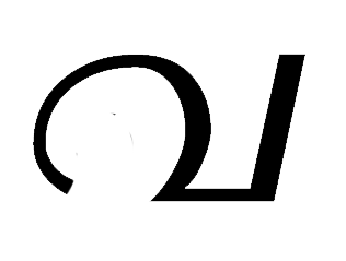 இது காலுக்கான தமிழ்க் குறியீடு ஆகும்.